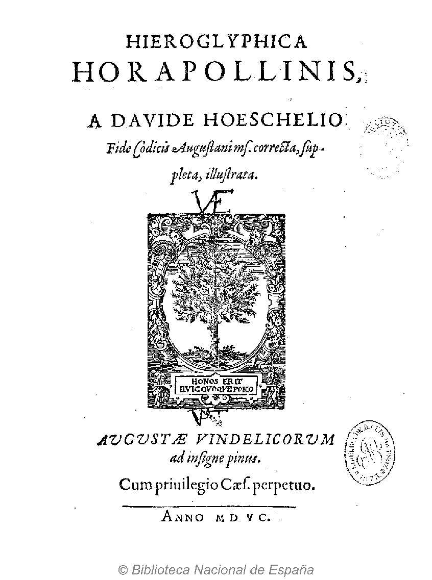 Hieroglyphica Horapollonis a Davide Hoeschelio ; fide codicis Augustanius correcta, suppleta, illustrata ; [horum versio latina Ioan. Merceri ...] Autor: Horapollo Niliacus ; Hoeschel, David (1556-1617) ; Mercier, Jean (1545-1600) ; Schultes, Johann (-1667?) Fecha: 1595 Datos de edición: Augustae Vindelicorum ad insigne pinus[Hans Schultes]